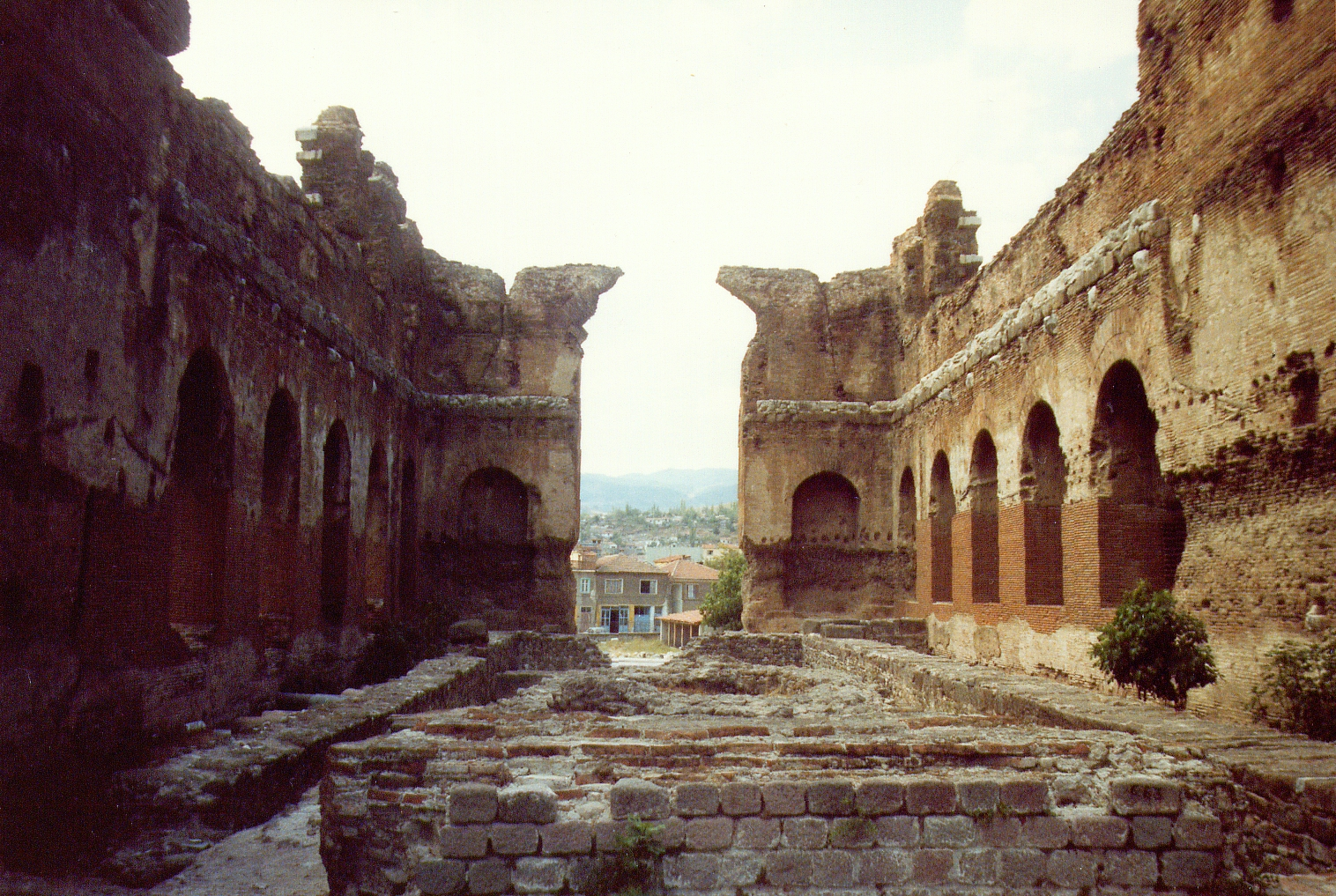 Rote Halle, Pergamon, Westtürkei, Innenraum von Osten